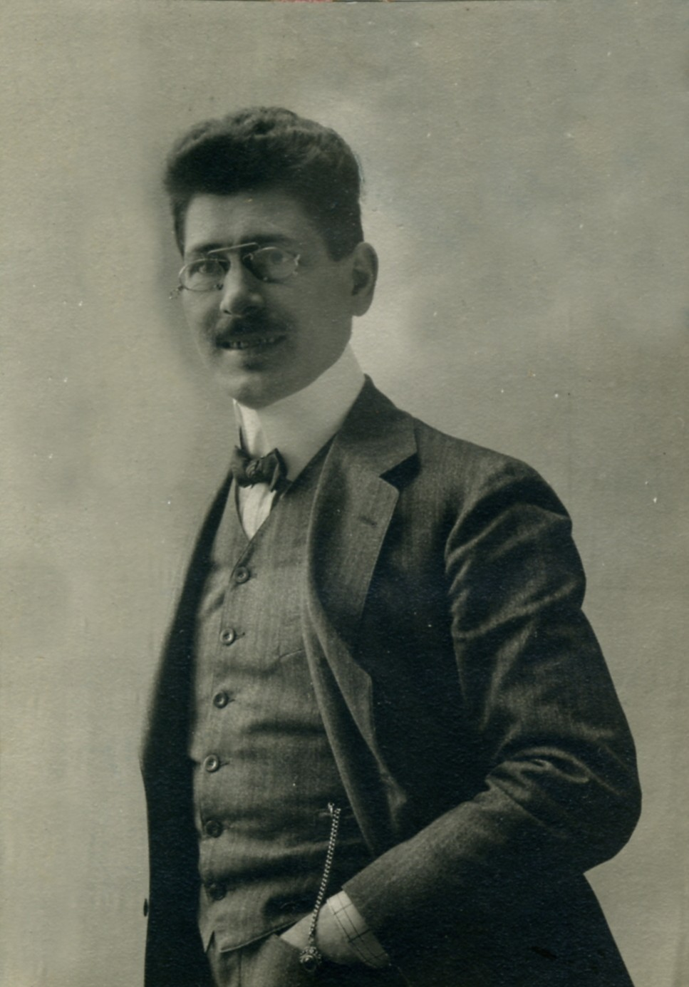 Fotografie von Hans Rohn um 1900